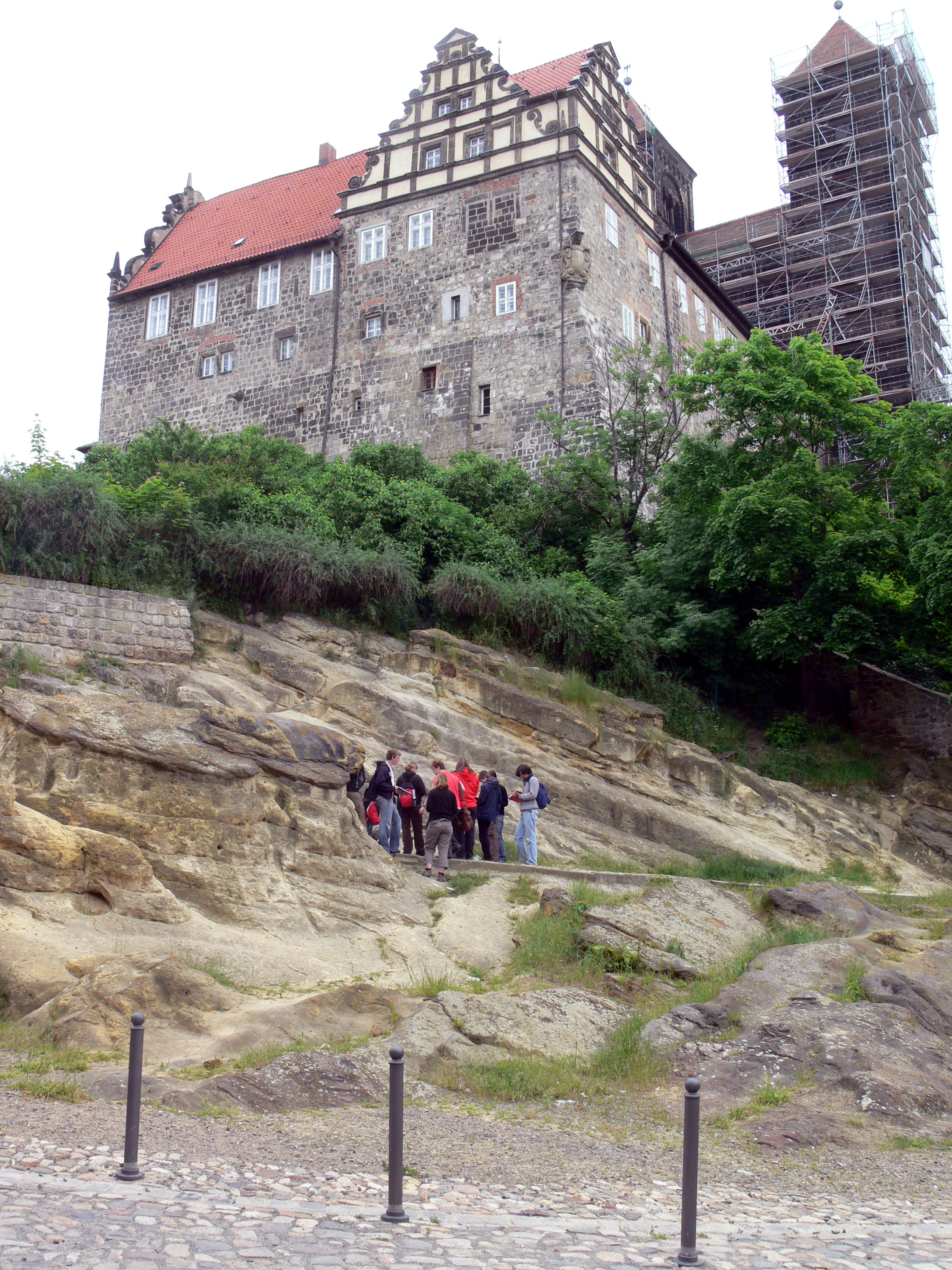 Schloss in Quedlinburg vom Wassertor aus.